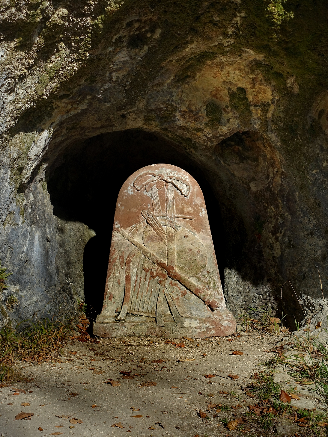 Gedenkstein in der Gessnergrotte von der Ermitage Arlesheim. Der Gedenkstein mit Namen, Leier (Symbol für Sänger) und Palette (Symbol für Maler), nach unten weisender Fackel (Symbol für Trauer) und Lorbeerkranz (Symbol für Ruhm). Der Gedenkstein wurde nach der Zerstörung 1793 im Jahr 1811 wiederhergestellt.